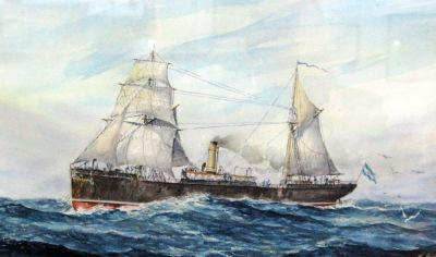 Óleo del Transporte de la Armada Argentina ARA Villarino de A.A. Silvestrini en 1880.